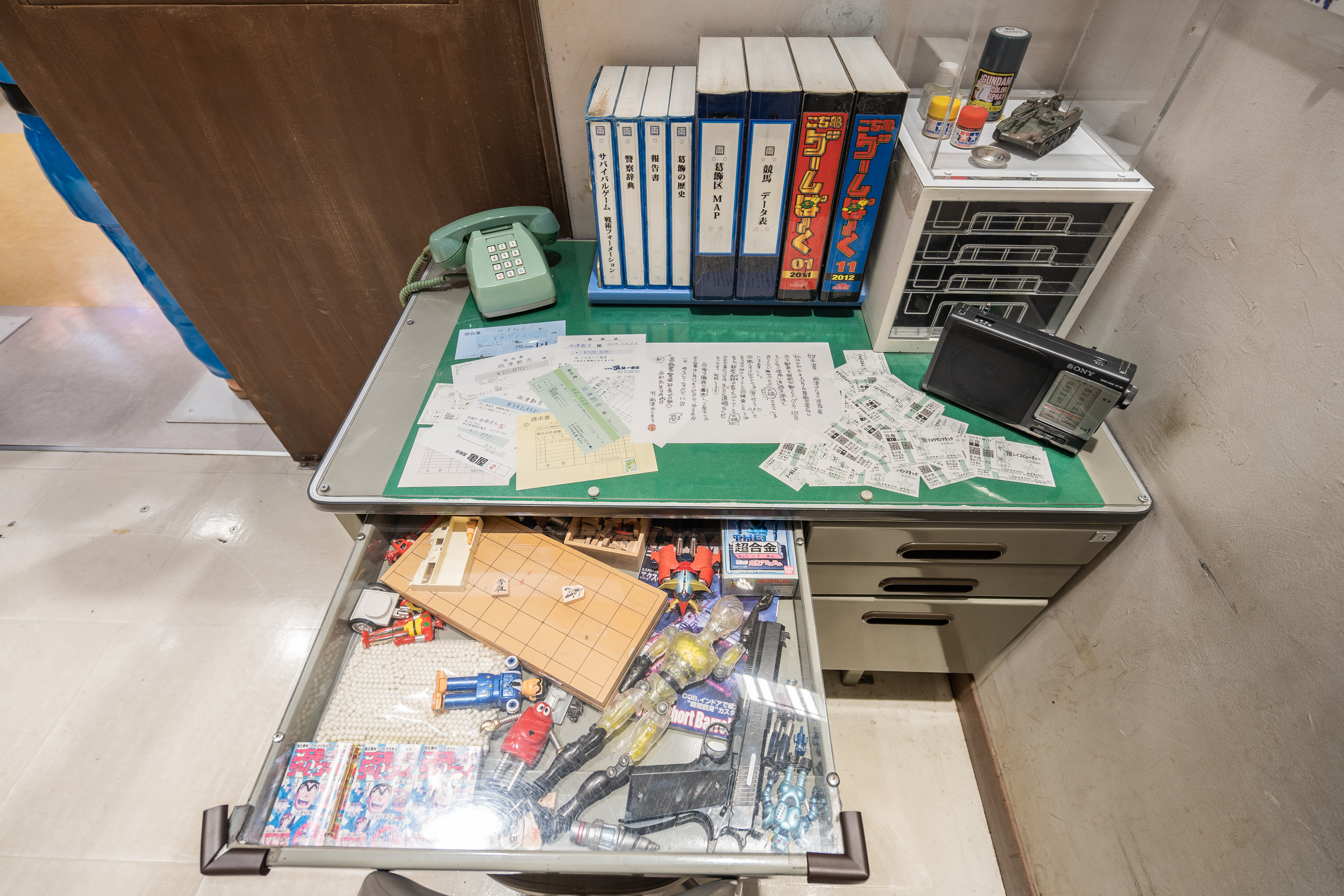 《烏龍派出所》兩津勘吉的工作桌。